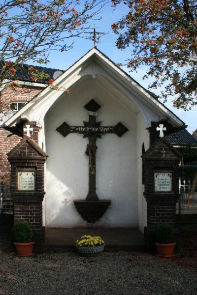 Denkmal Nr. 9 in Grefrath